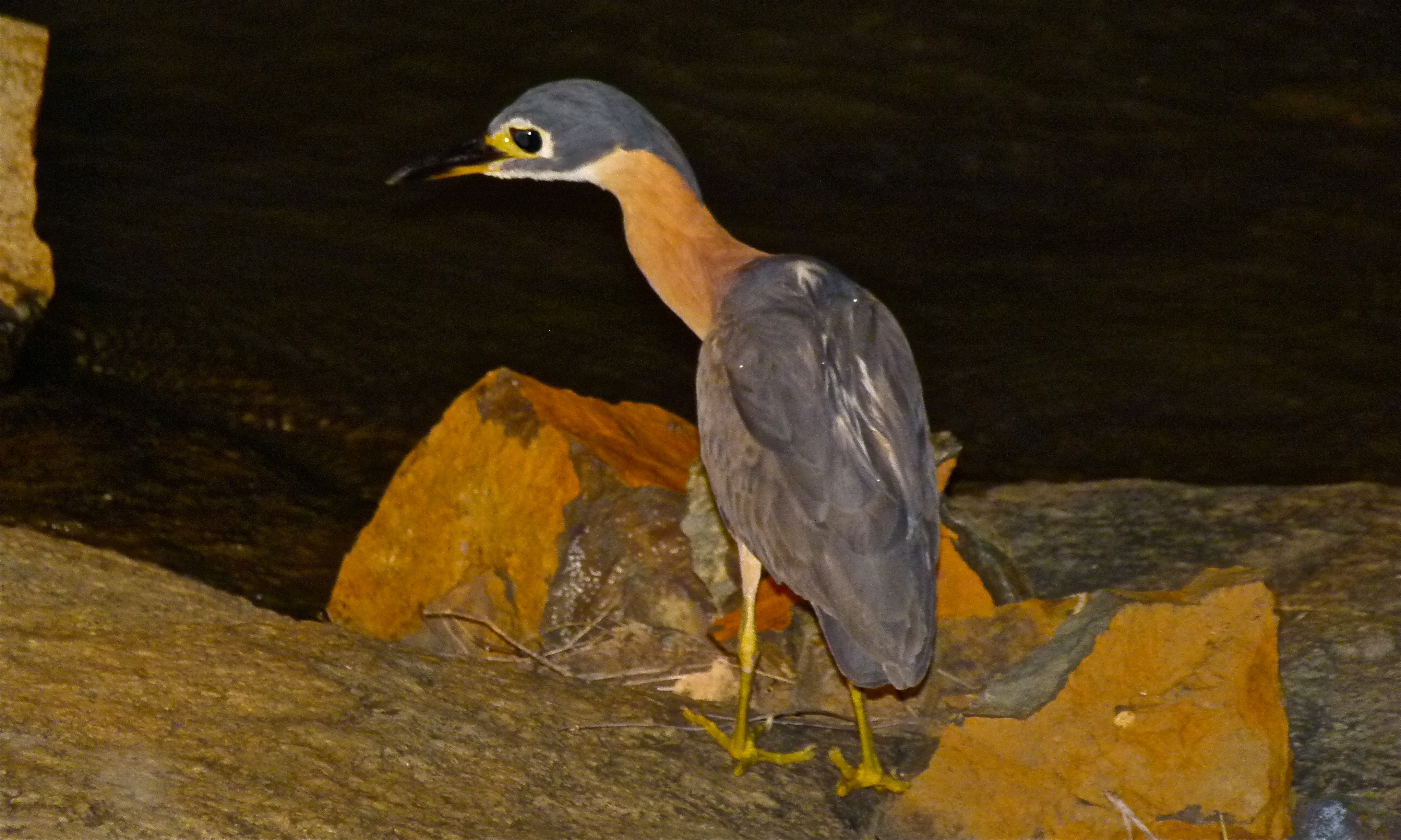 Sabie River Bridge near Lower Sabie, Kruger NP, SOUTH AFRICA